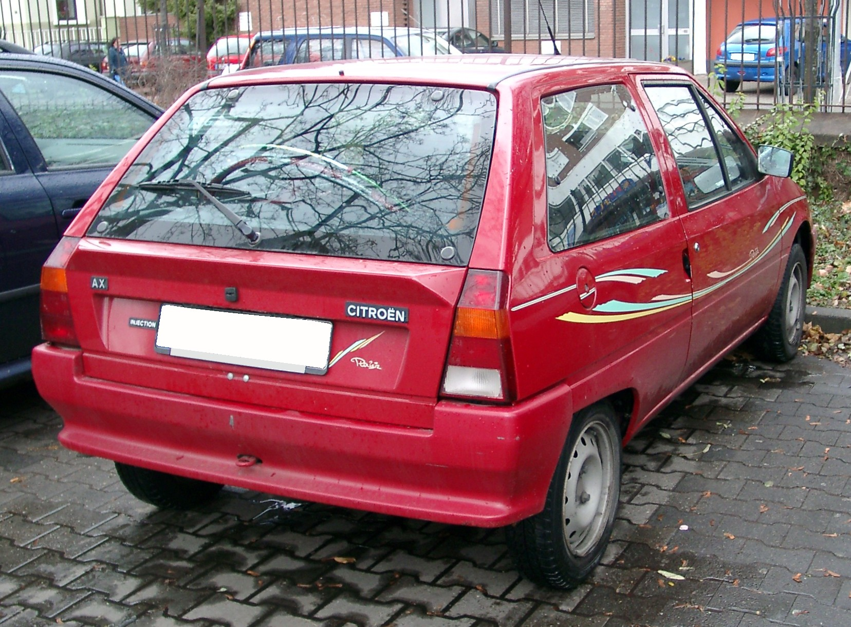 Citroën AX